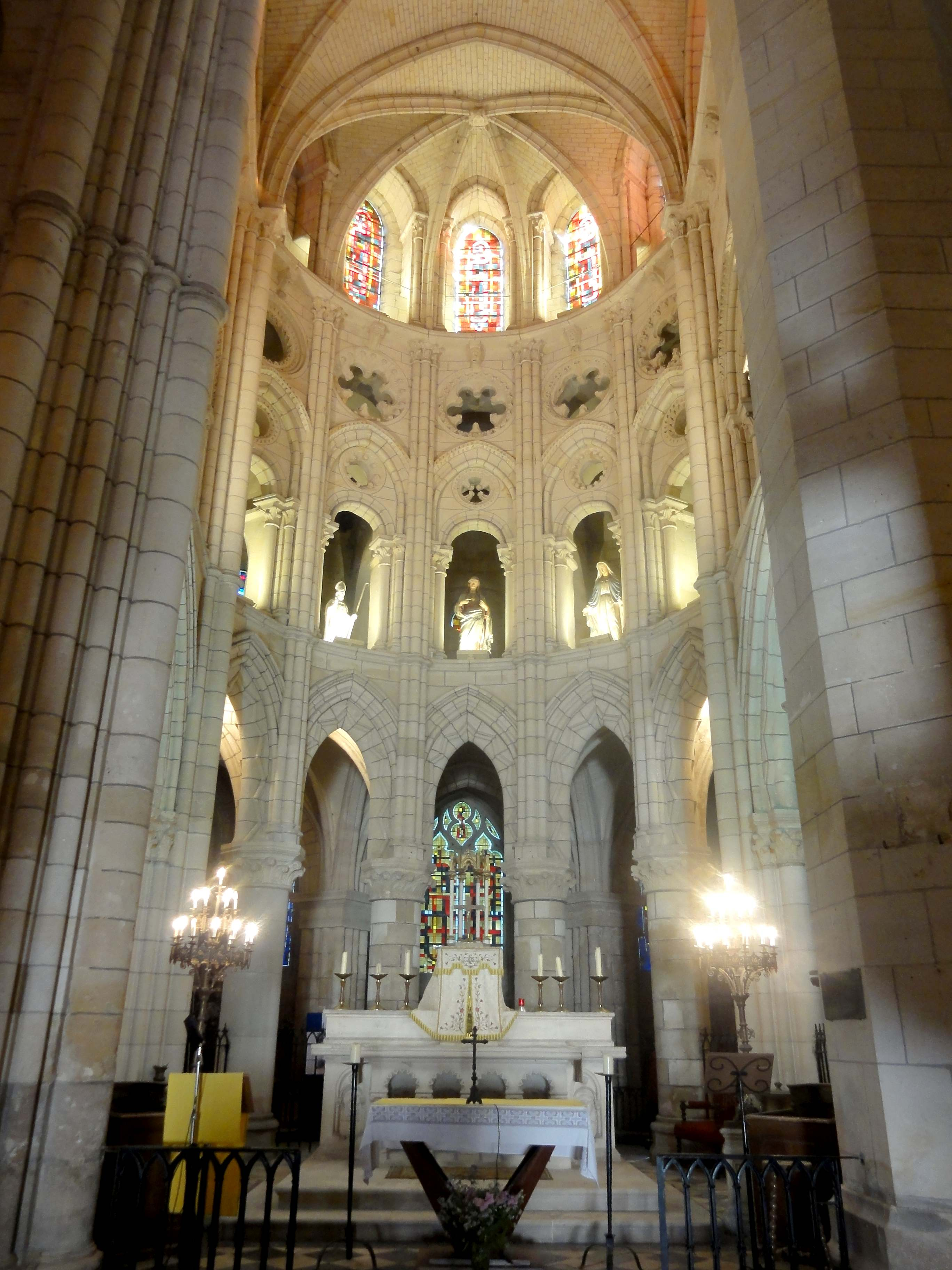 Croisée, vue vers l'est.